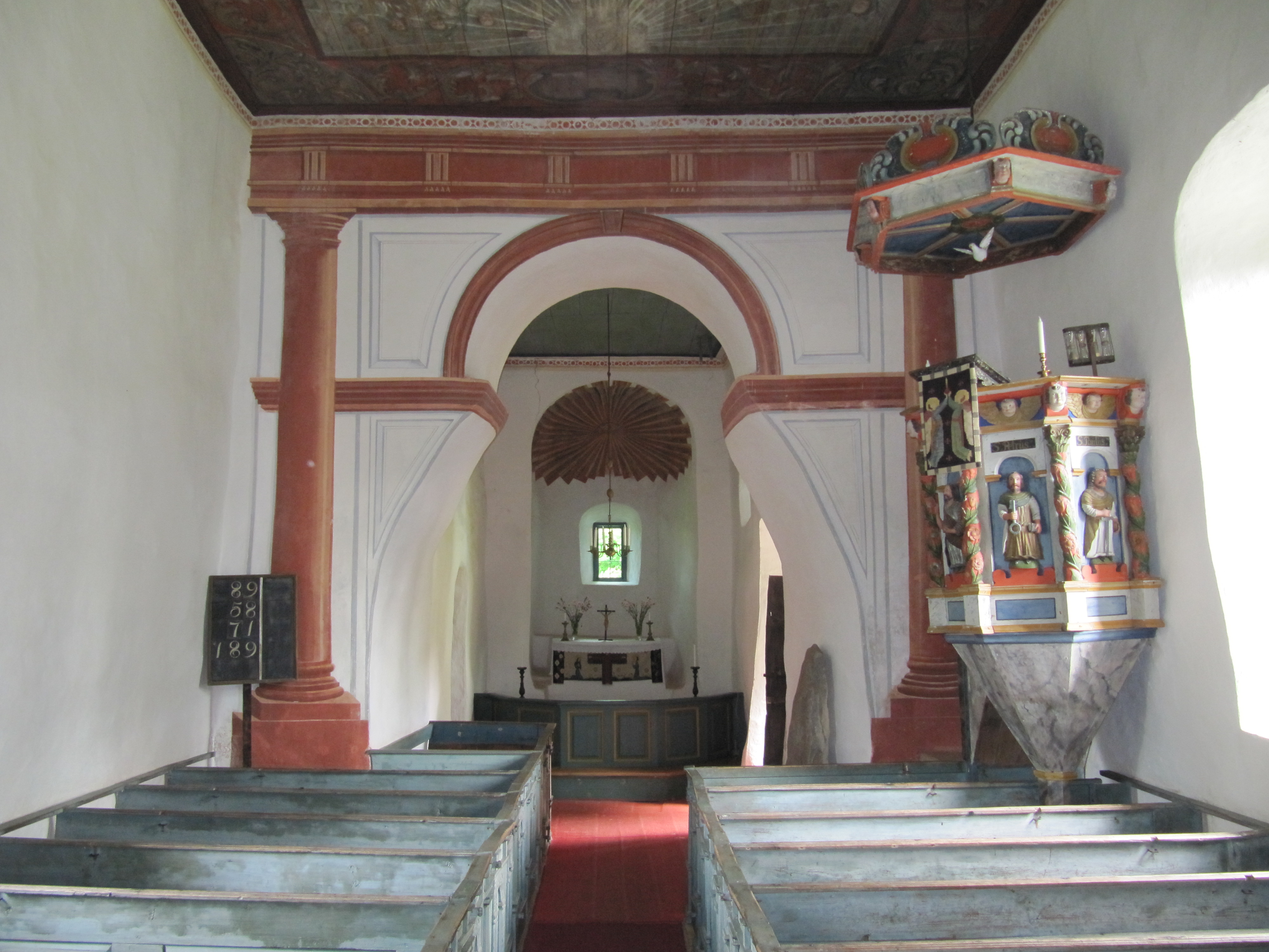 Kyrkorum vid Vallsjö gamla kyrka